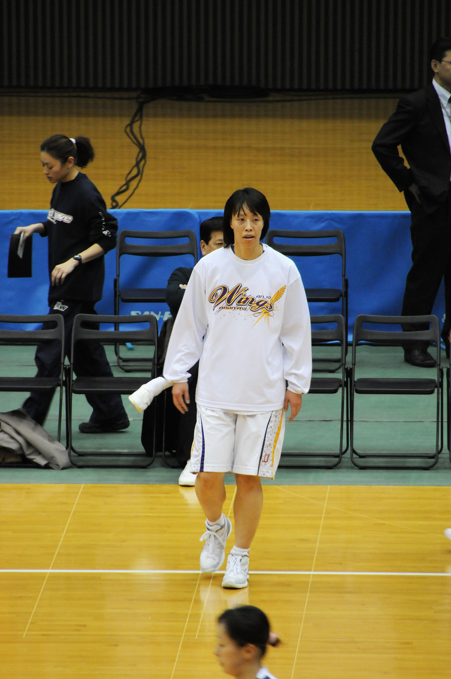 アイシンAWウィングスの江口真紀選手。とどろきアリーナで。